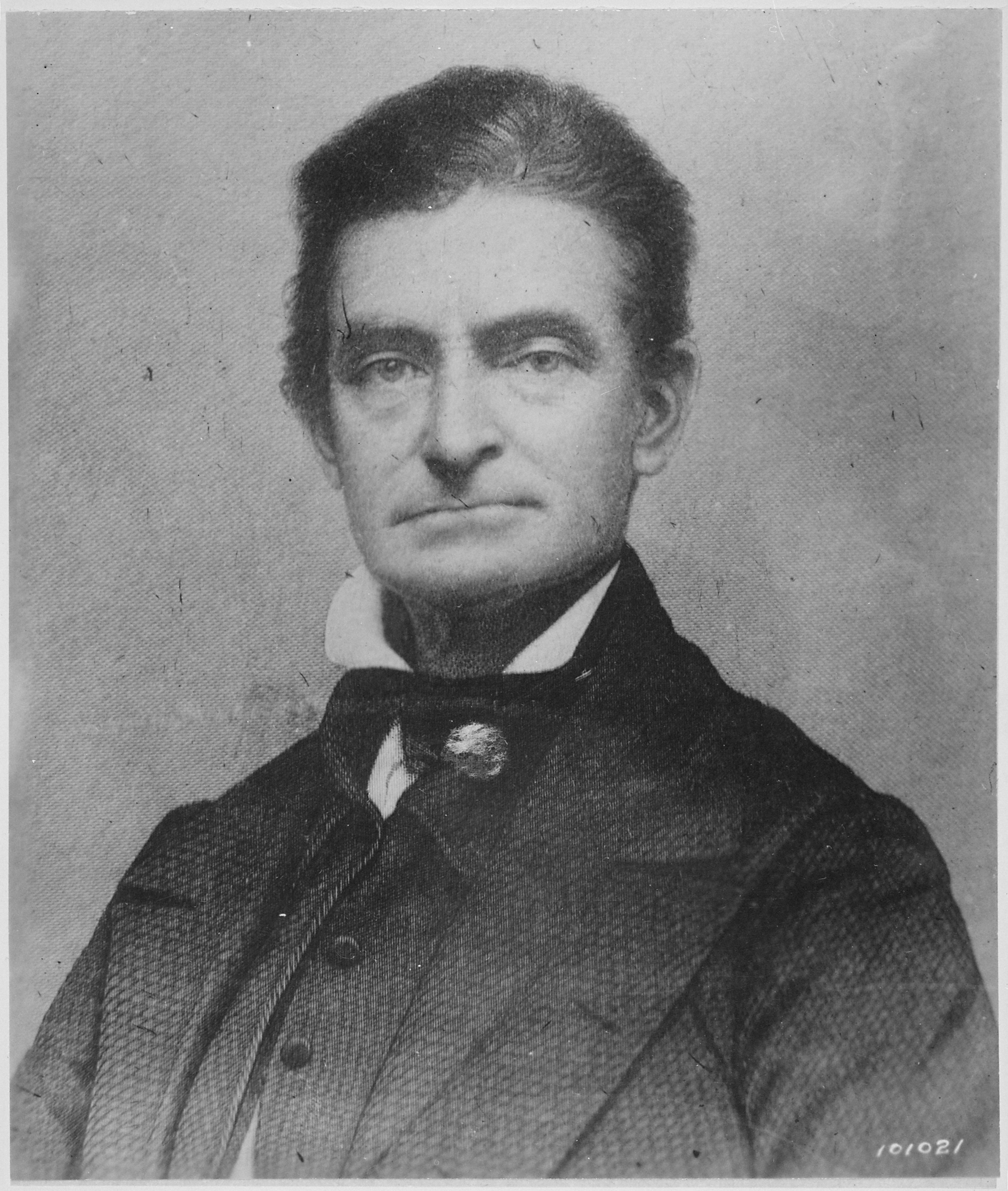 General notes: Engraving from daguerreotype